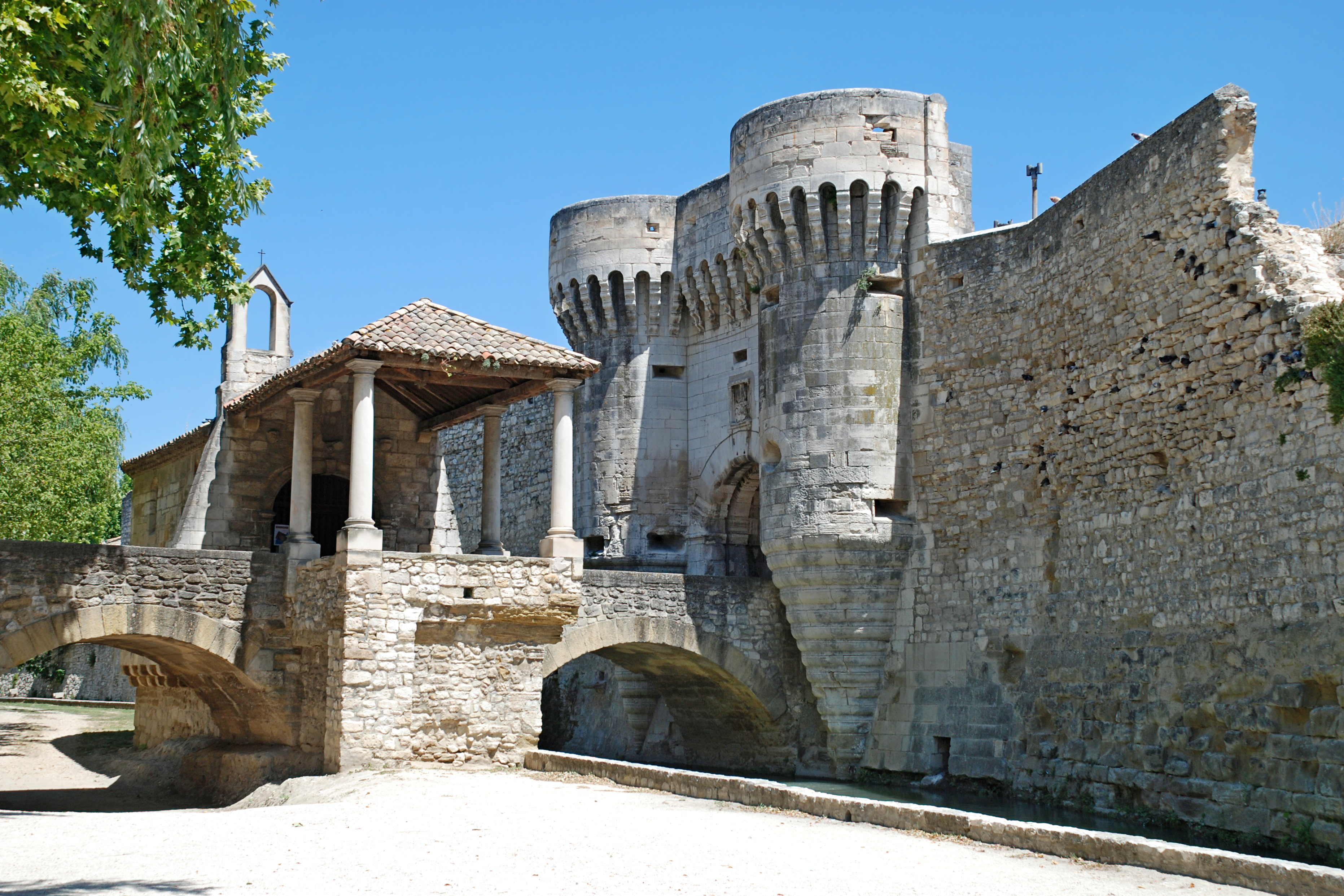 France - Provence - Vaucluse - Pernes-les-Fontaines - Chapelle et porte Notre-Dame